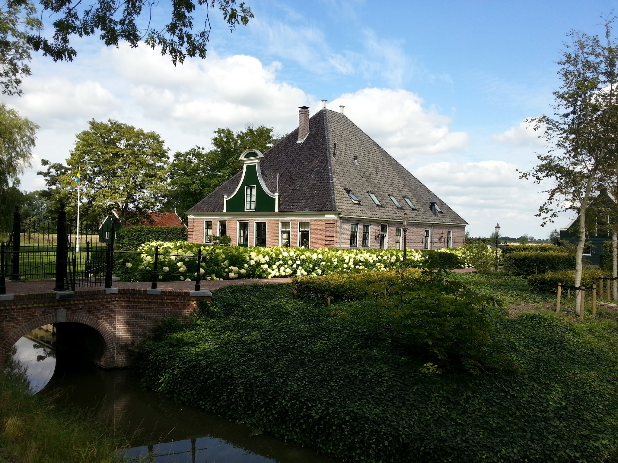 Noordhollandse stolpboerderij, "Landlust" in de Zuidoostbeemster